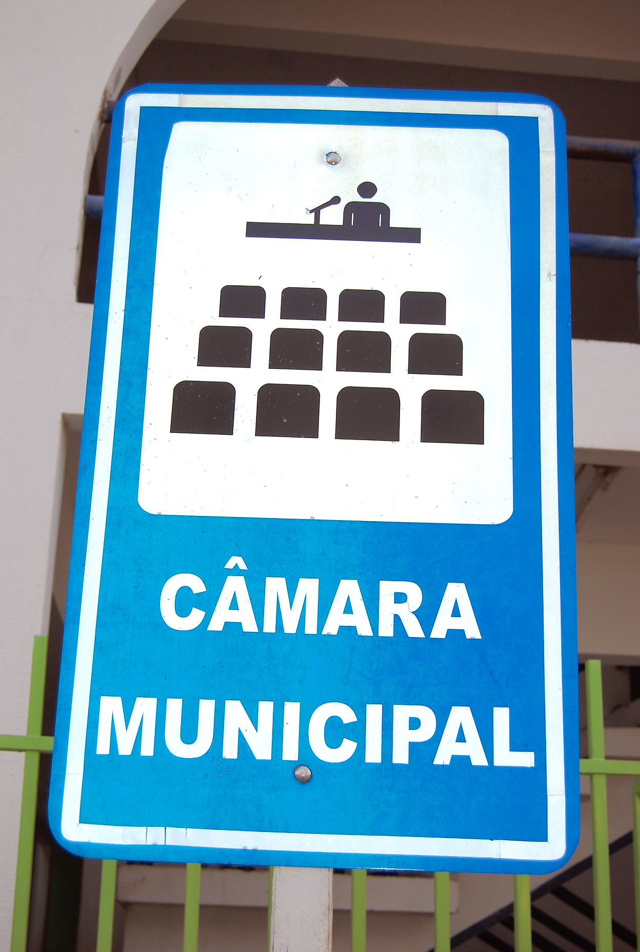 Placa indicativa de Câmara Municipal de acordo com o Código de Trânsito Brasileiro.